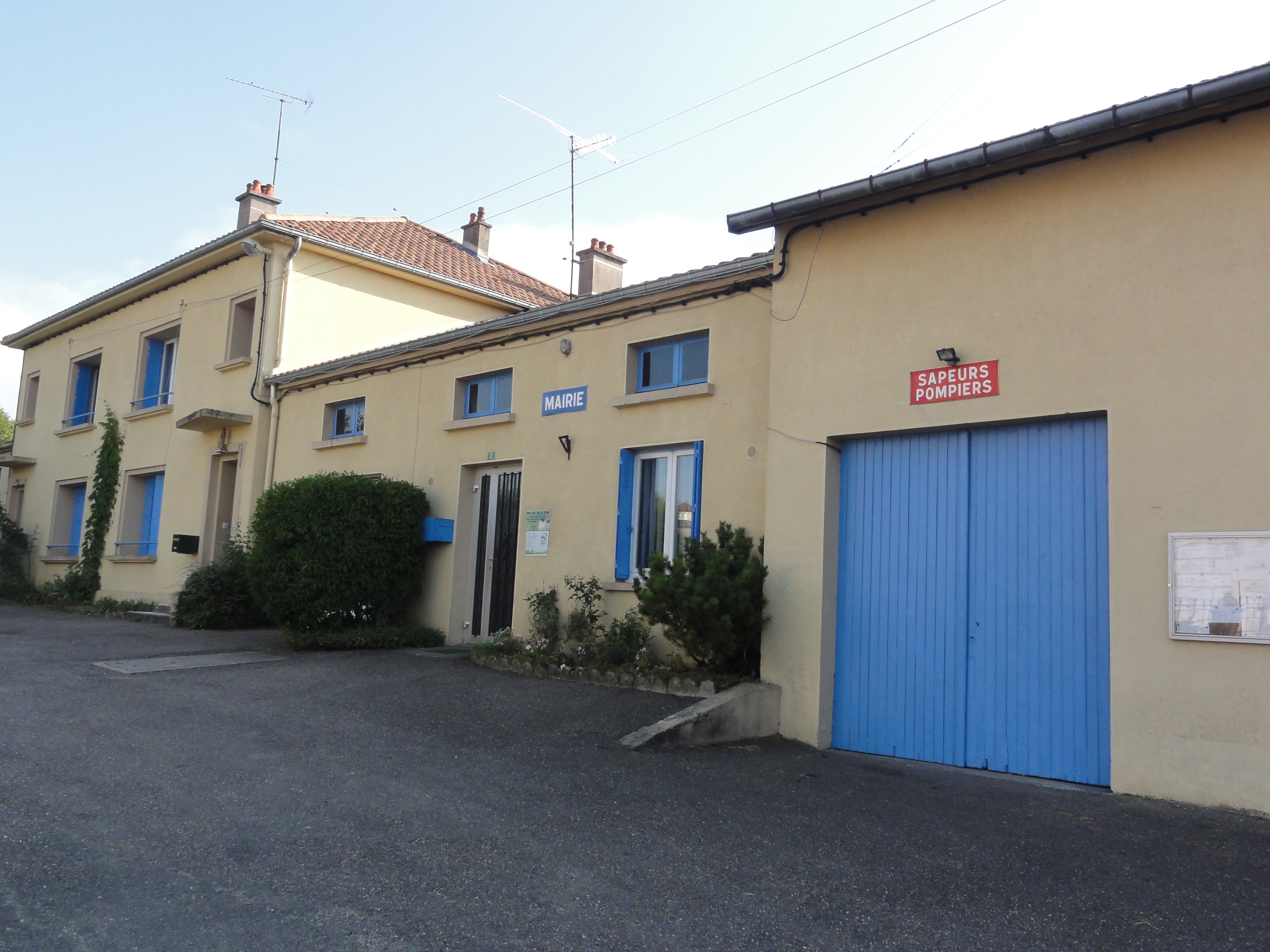 Fromeréville (Meuse) mairie et sapeurs-pompiers